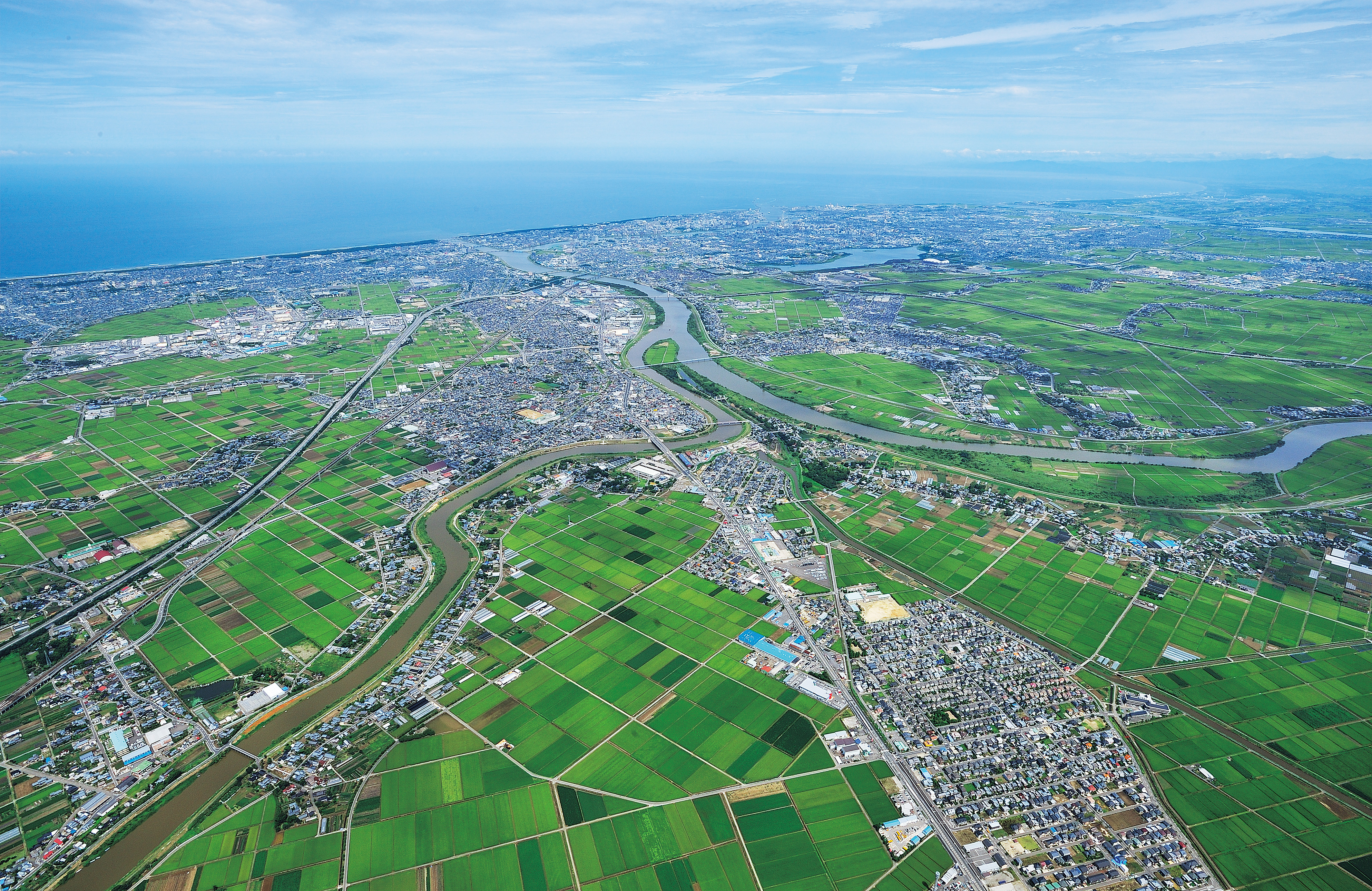 新潟市街と田園 新潟市 2008年撮影